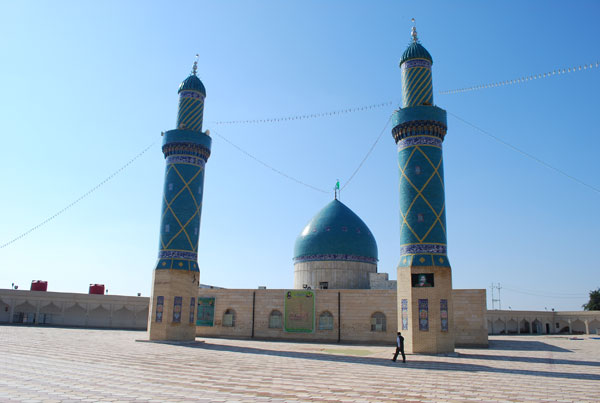 مقام علي الشرقي في ناحية علي الشرقي في ميسان جنوب العراق